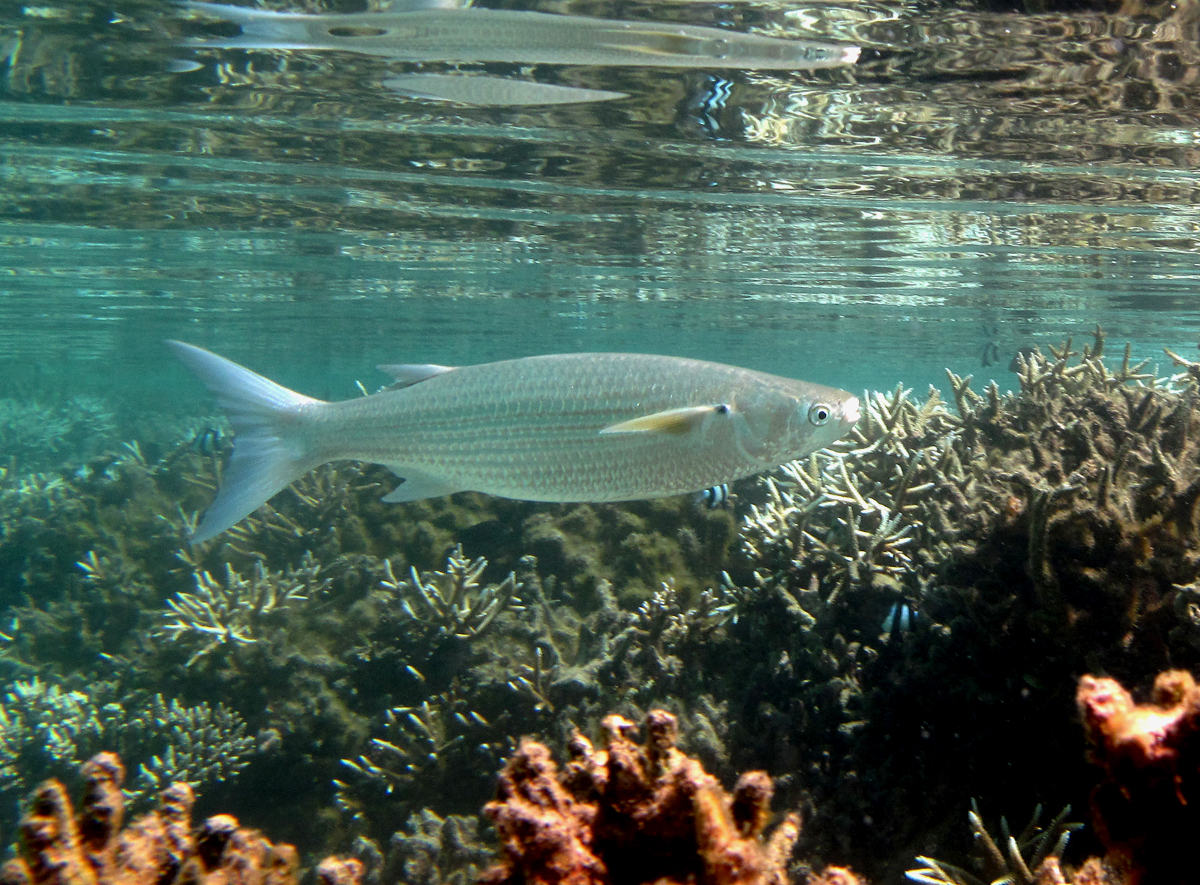 Un mulet Oedalechilus labiosus à la Réunion.